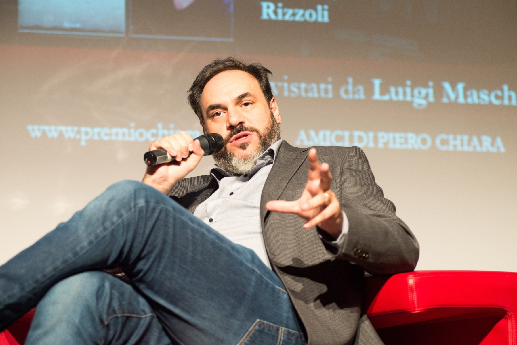 Luca Ricci, scrittore italiano